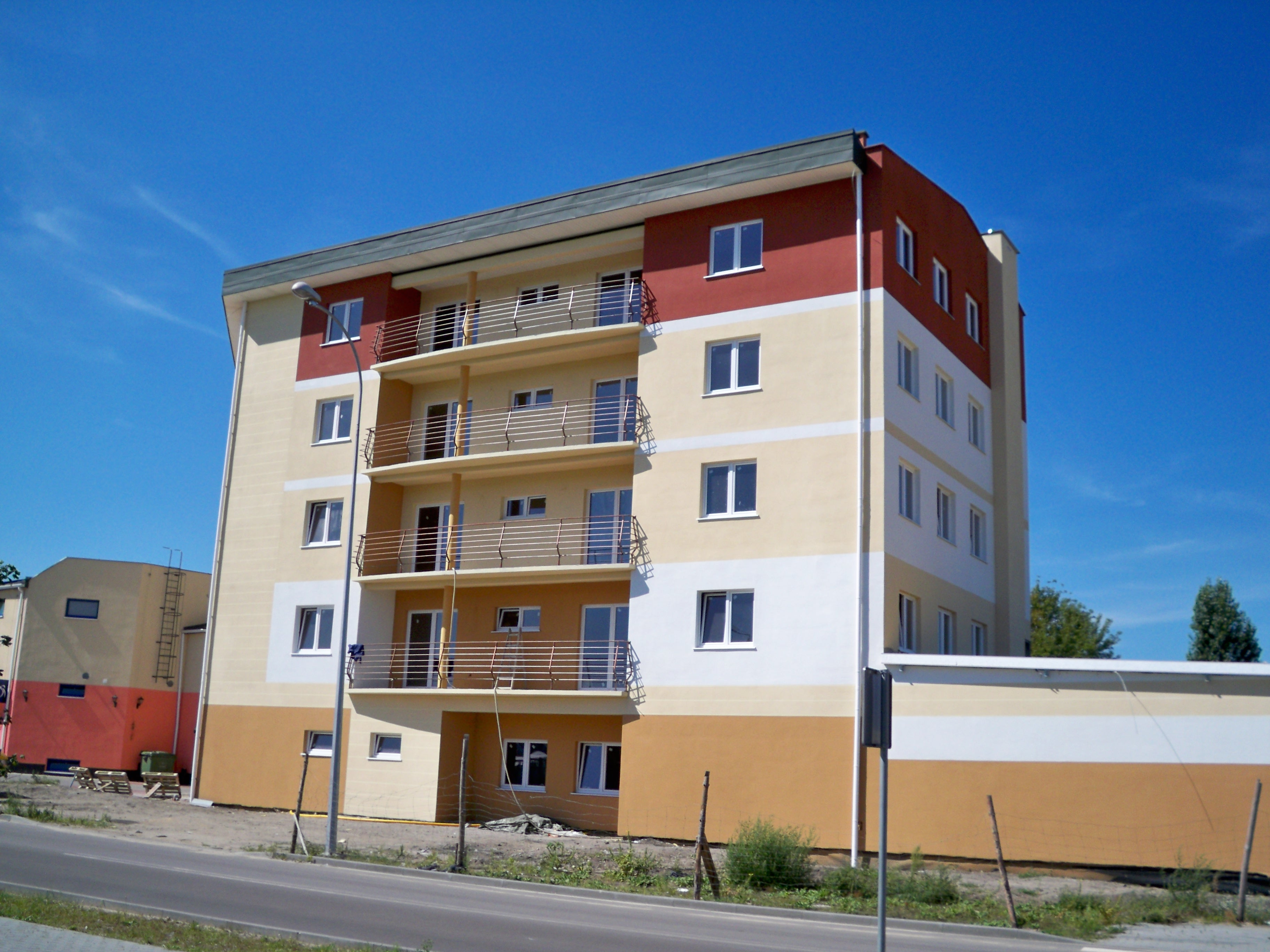 Nowy blok przy ul. Celulozowej 21 (2009 r.)